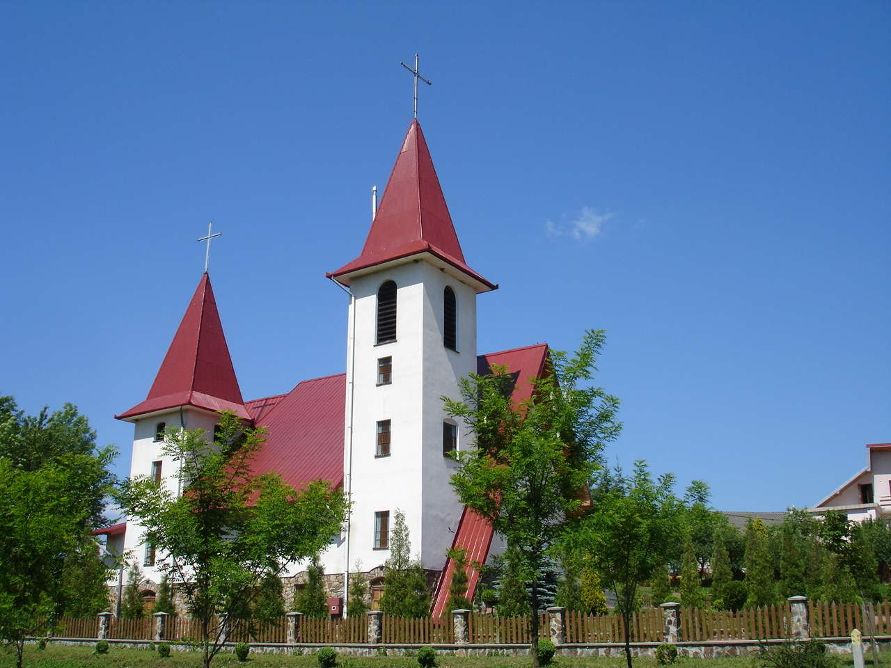 Roman Catholic church in Wola Sękowa (Gmina Bukowsko)